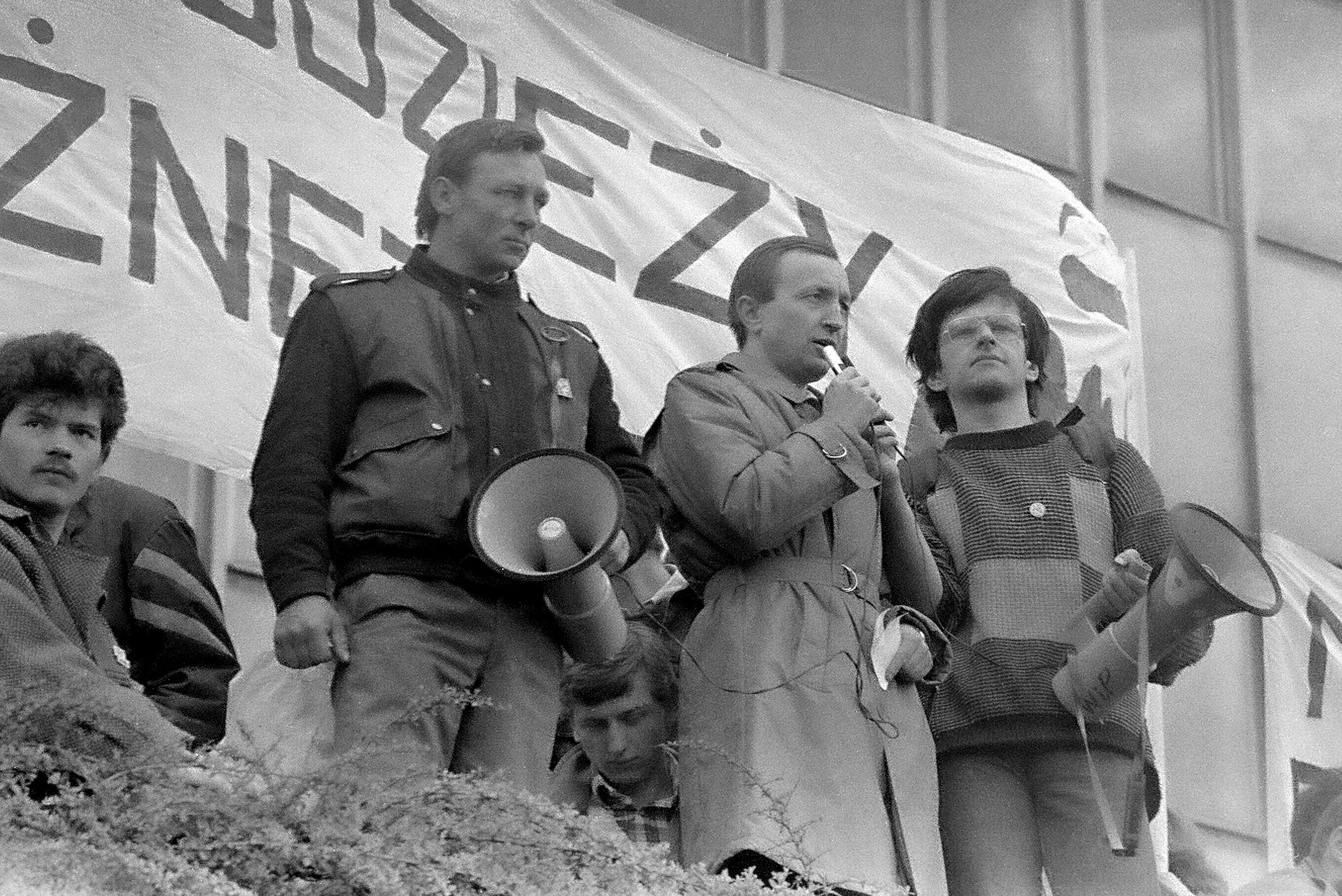 Stanisław Żytkowski przemawia do mieszkańców Gorzowa Wlkp. podczas protestu przeciwko planom budowy elektrowni atomowej w Klempiczu ( 2. 04. 1989 r.)